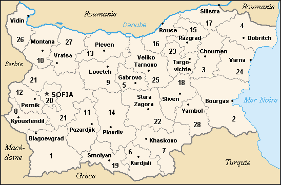 Sujet : carte des 28 oblasti (régions) de la Bulgarie existant depuis fr:1999 Auteurs : fond de carte créé par Потребител:Ljubo (Любомир Таушанов = Lyoubomir Taïchanov) pour Картинка:Bulgaria admin.png (version du 25 avril 2005) adaptation française, par Utilisateur:Hégésippe Cormier Notes : un point noir donne la localisation d'une ville chef-lieu d'un oblast l'étoile noire montre la localisation de la ville de Sofia, à la fois capitale nationale, chef-lieu de l'oblast de Sofia-Grad et où siège le gouverneur de l'oblast de Sofia (hors Sofia-Grad) la numérotation des oblasti suit l'ordre alphabétique français, et n'est pas utilisable sur les autres wikis Licence : Catégorie:Cartes de Bulgarie